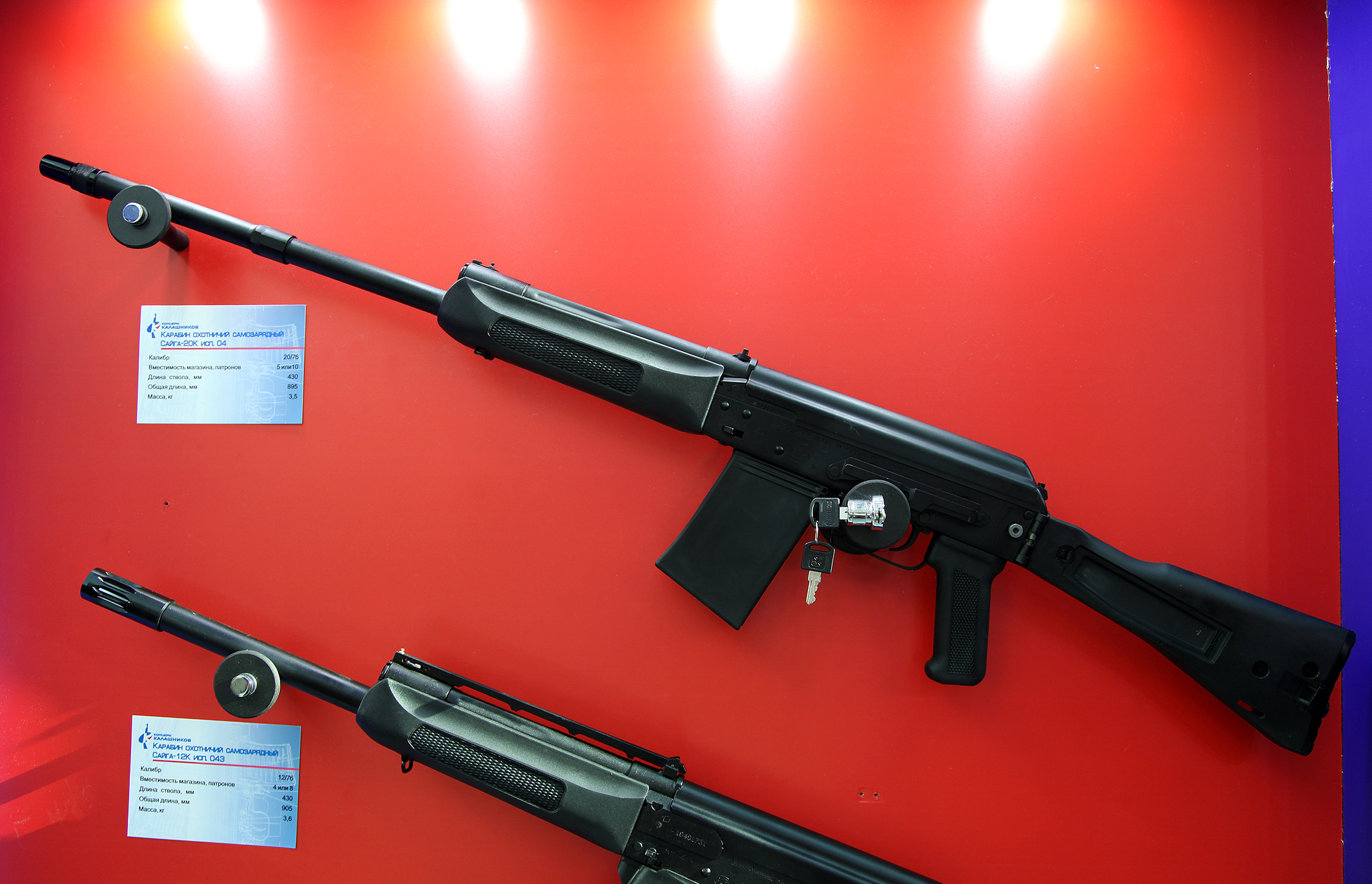 20x76 карабин Сайга-20К исп. 04 (20x76 Saiga-20K-04)